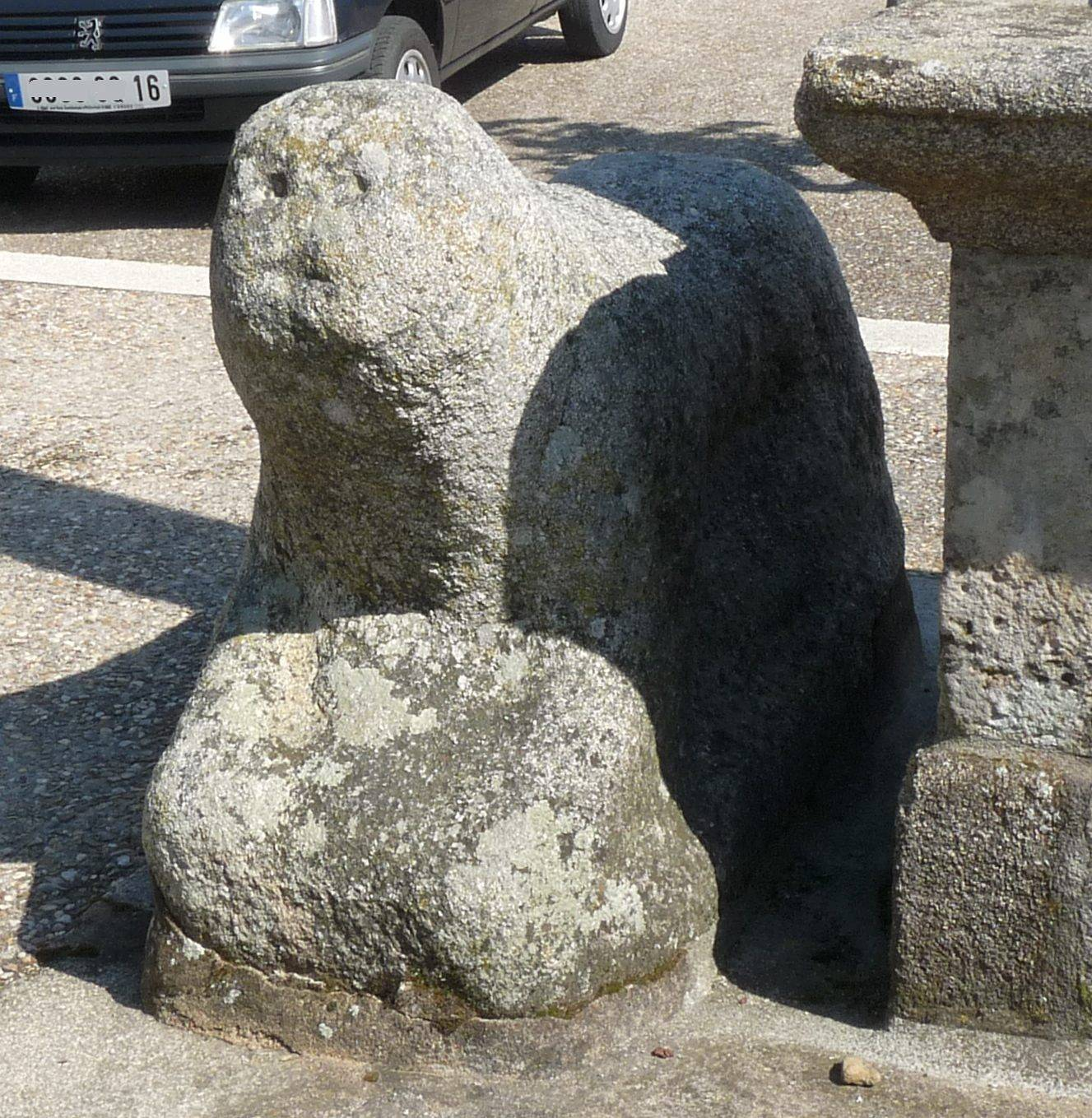 Lion de Saint-Maurice-des-Lions, Charente, France